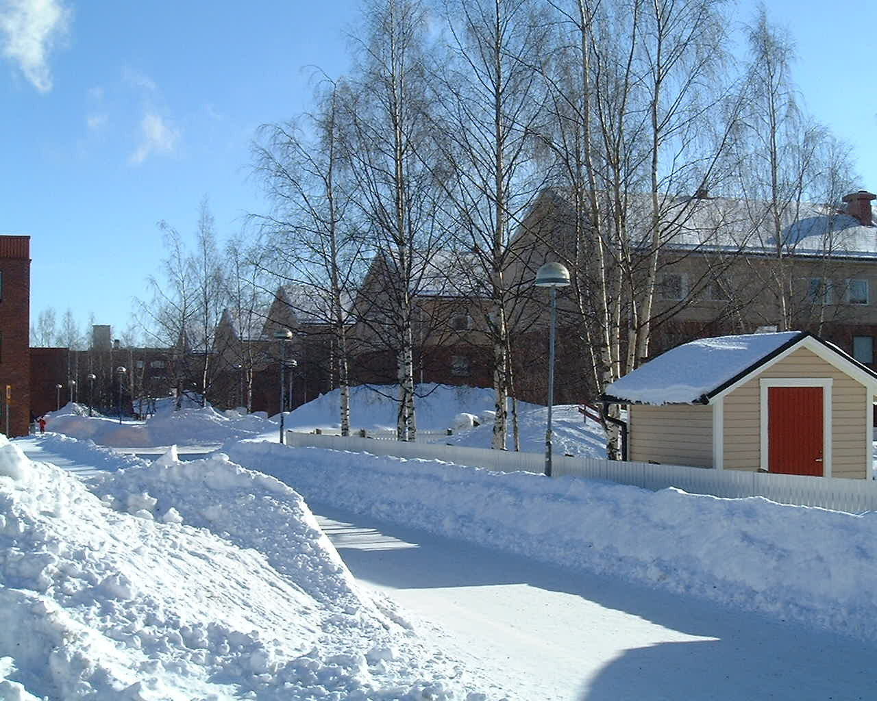 Historiegränd, Ålidhem, Umeå, Västerbotten, Sverige